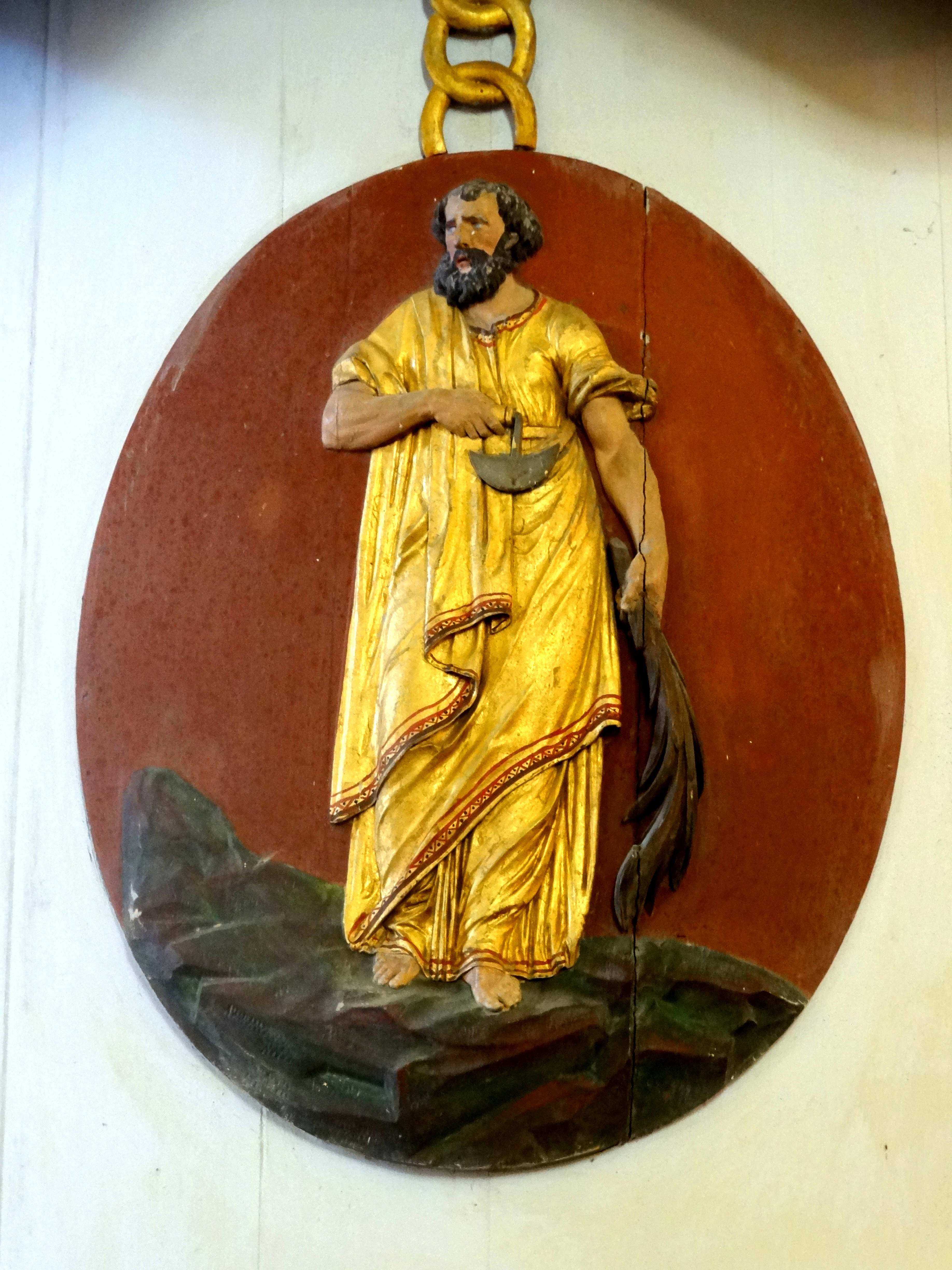 Mobilier de l'église - voir titre.